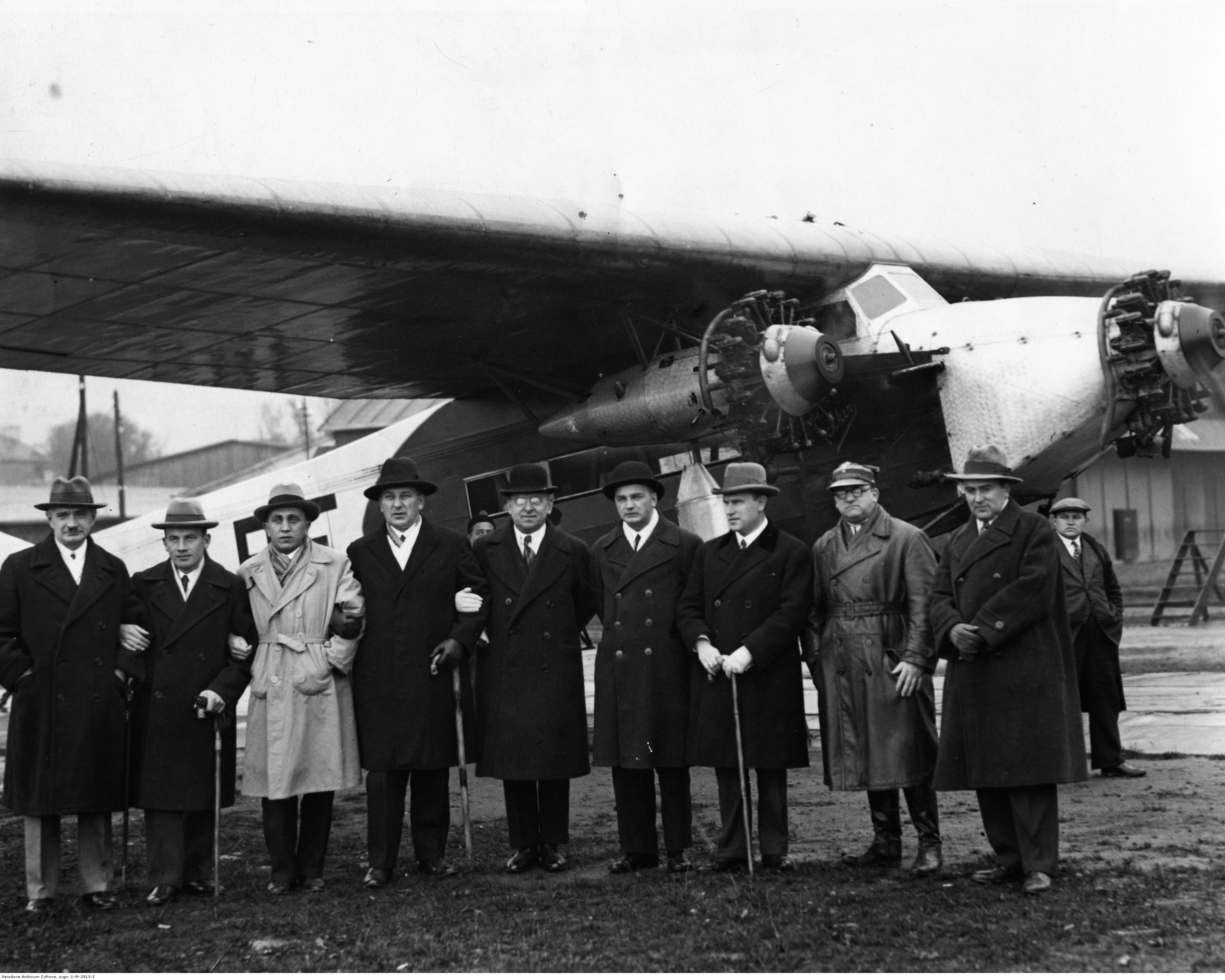 Wizyta przedstawicieli estońskiej Ligi Obrony Powietrznej Państwa oraz estońskich władz lotniczych w Warszawie. Na tle samolotu komunikacyjnego Fokker F.VIIb-3m widoczni m.in: Oskar Koster (4. z lewej), sekretarz generalny Aeroklubu RP major Bogdan Kwieciński (2. z prawej), prezes ZG Ligi Obrony Powietrznej i Przeciwgazowej dr Zenon Martynowicz (w środku), inspektor lotnictwa Elbrecht (4. z prawej), sekretarz estońskiej Ligi Tiitso (3. z prawej).